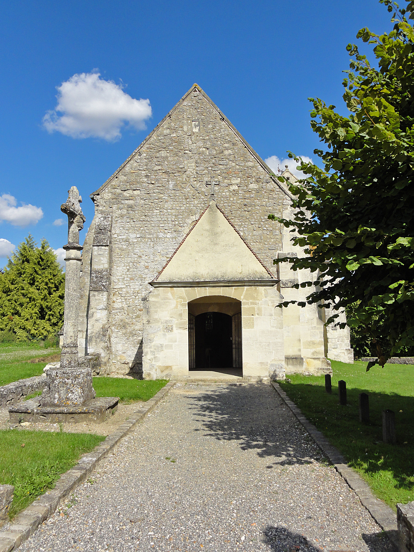 L'église Saint-Romain de Wy-dit-Joli-Village (Val-d'Oise), France.